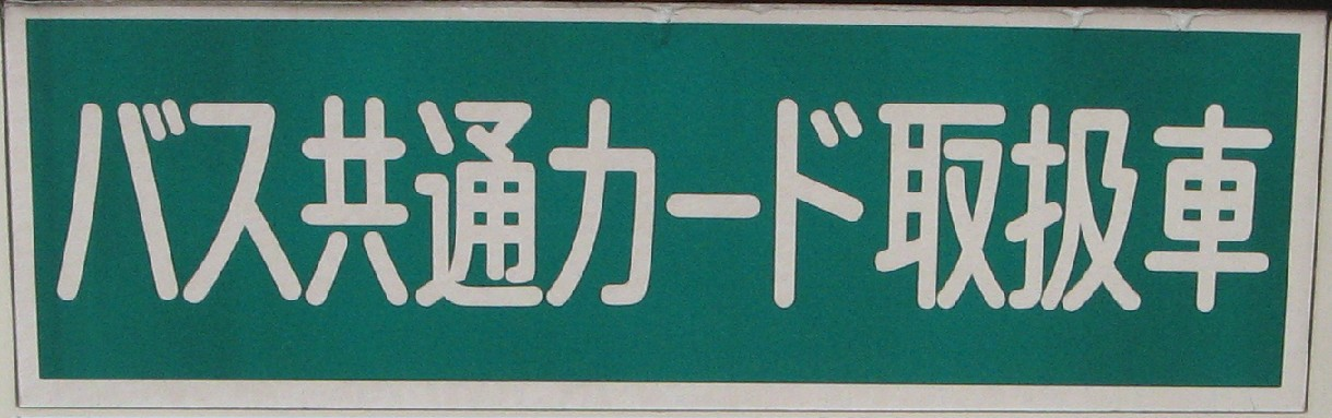 バス共通カードが使えるバス車両に貼られる「バス共通カード取扱車」ステッカー。